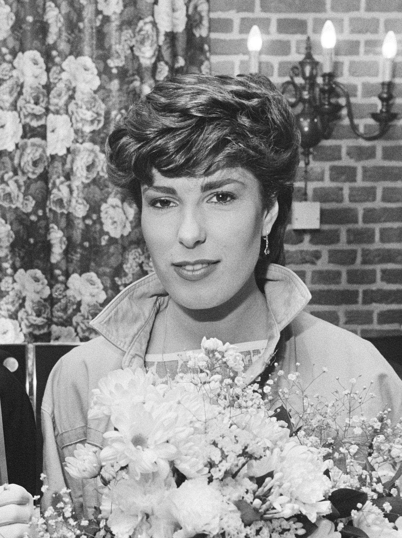 Carola Smit